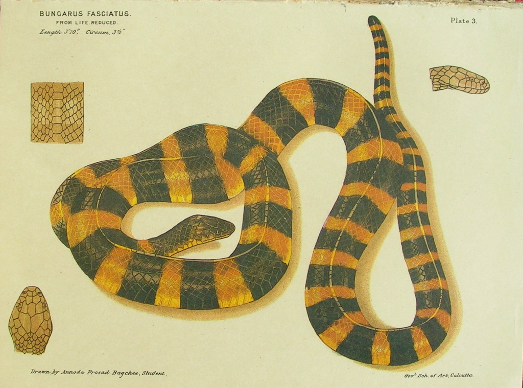 Bungarus fasciatus illustration